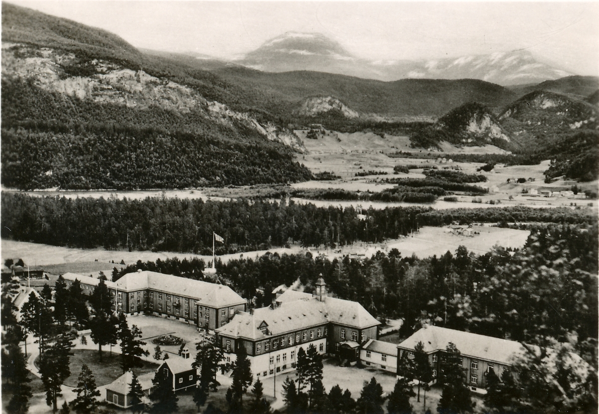 Vensmoen sanatorium, oversiktsbilde